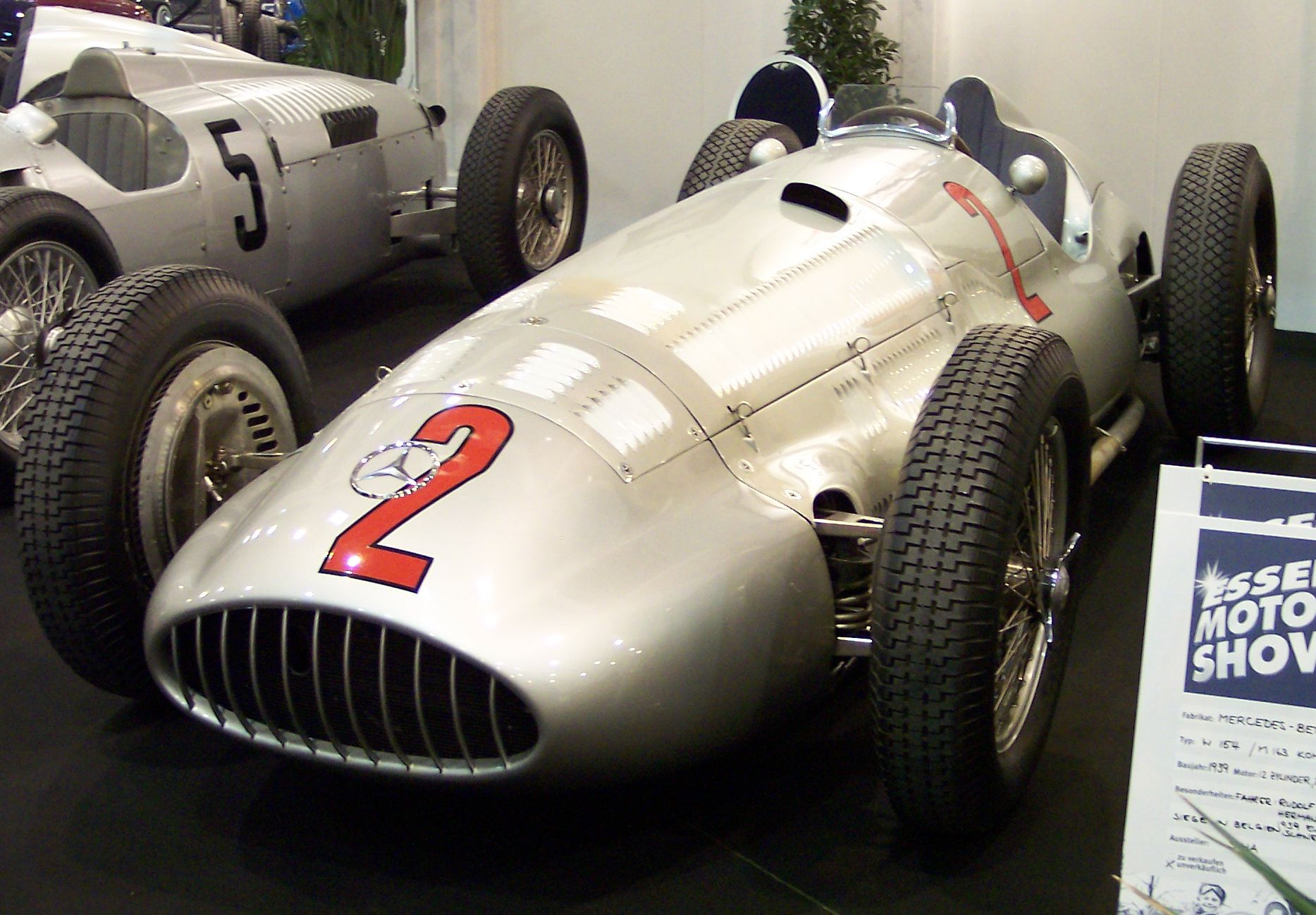 Source: Eigenes Bild